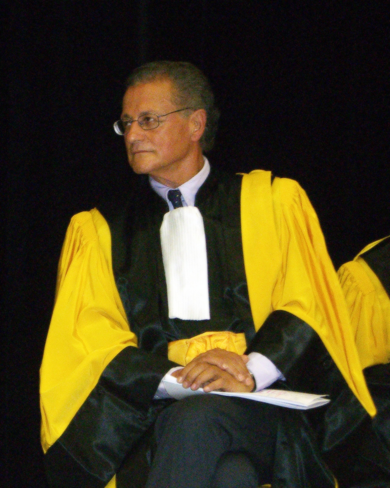 Foto personale di Paolo Fabbri